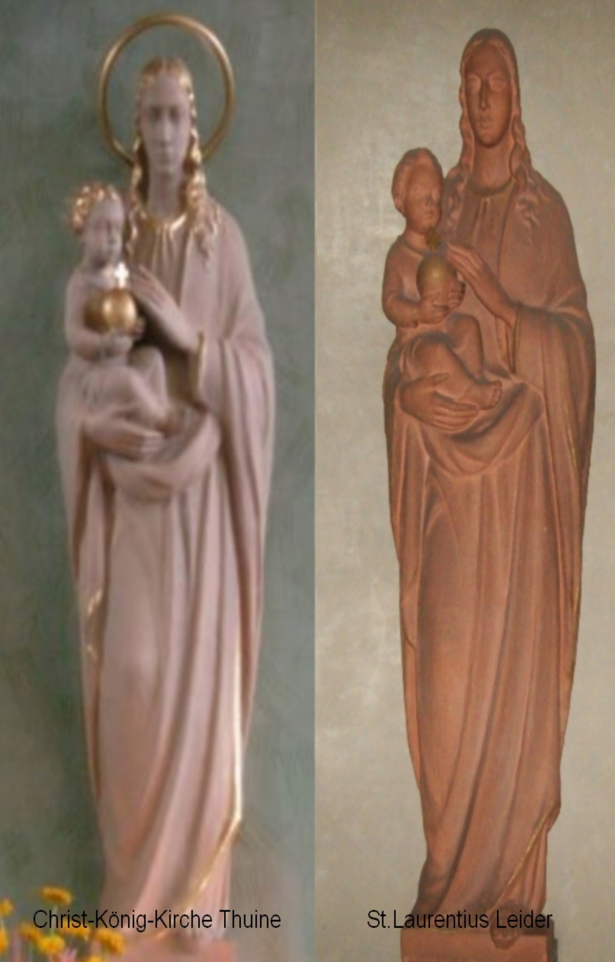 Marienaltar von Johann Josef Belz 1873-1957 für die Christ-König-Kirche In Thuine 1929/ Laurentius-Kirche Aschaffenburg 1923